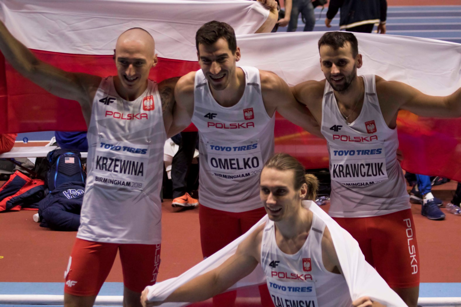 WK040411pools 4x400m herenteam